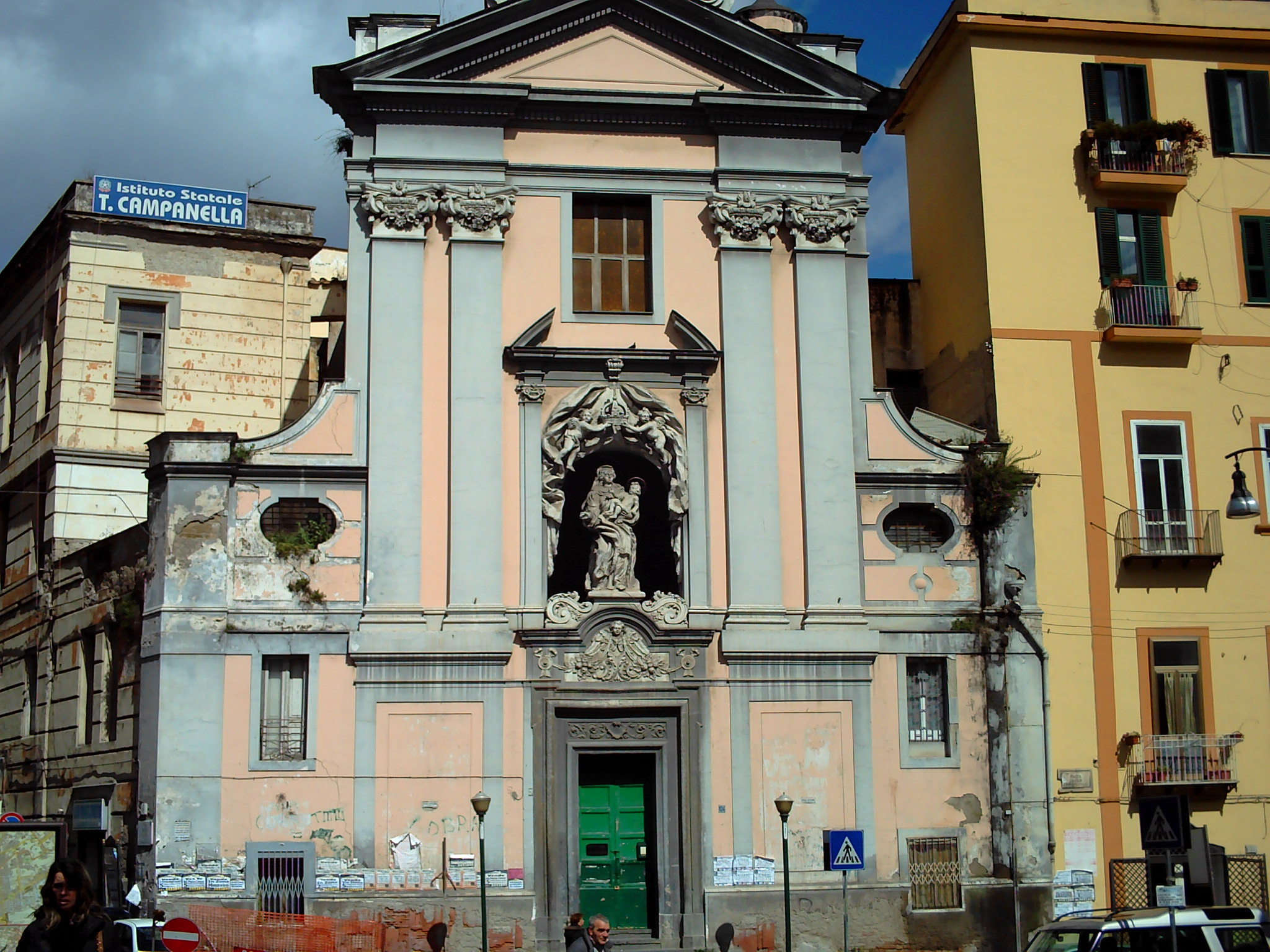 Facciata Santa Maria del Rosario alle Pigne (Napoli)